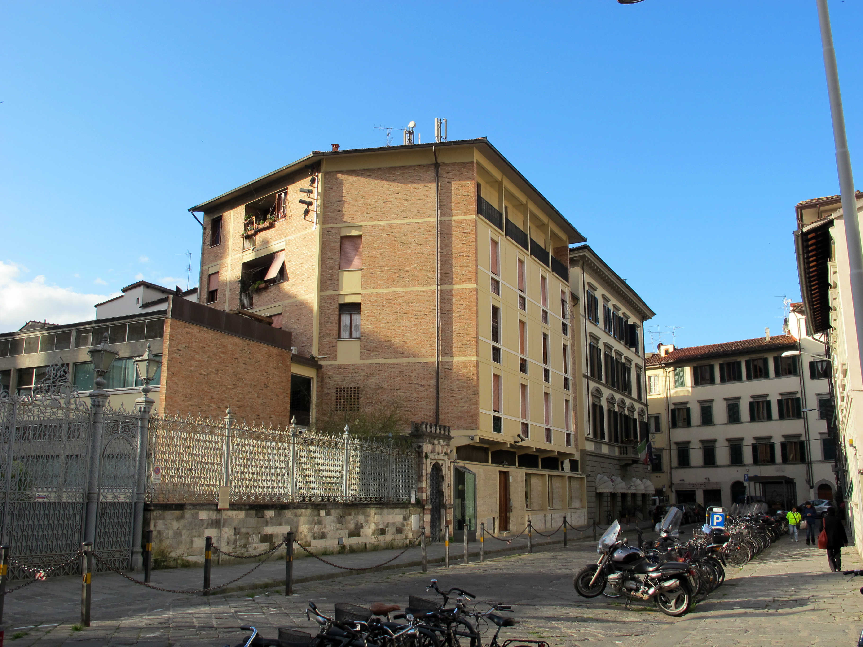 Via farini, veduta